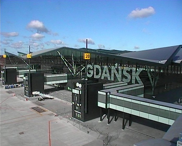 Terminal 2